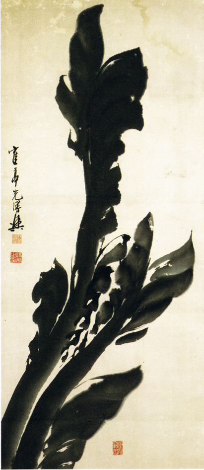 鶴亭「芭蕉図」 関西大学所蔵